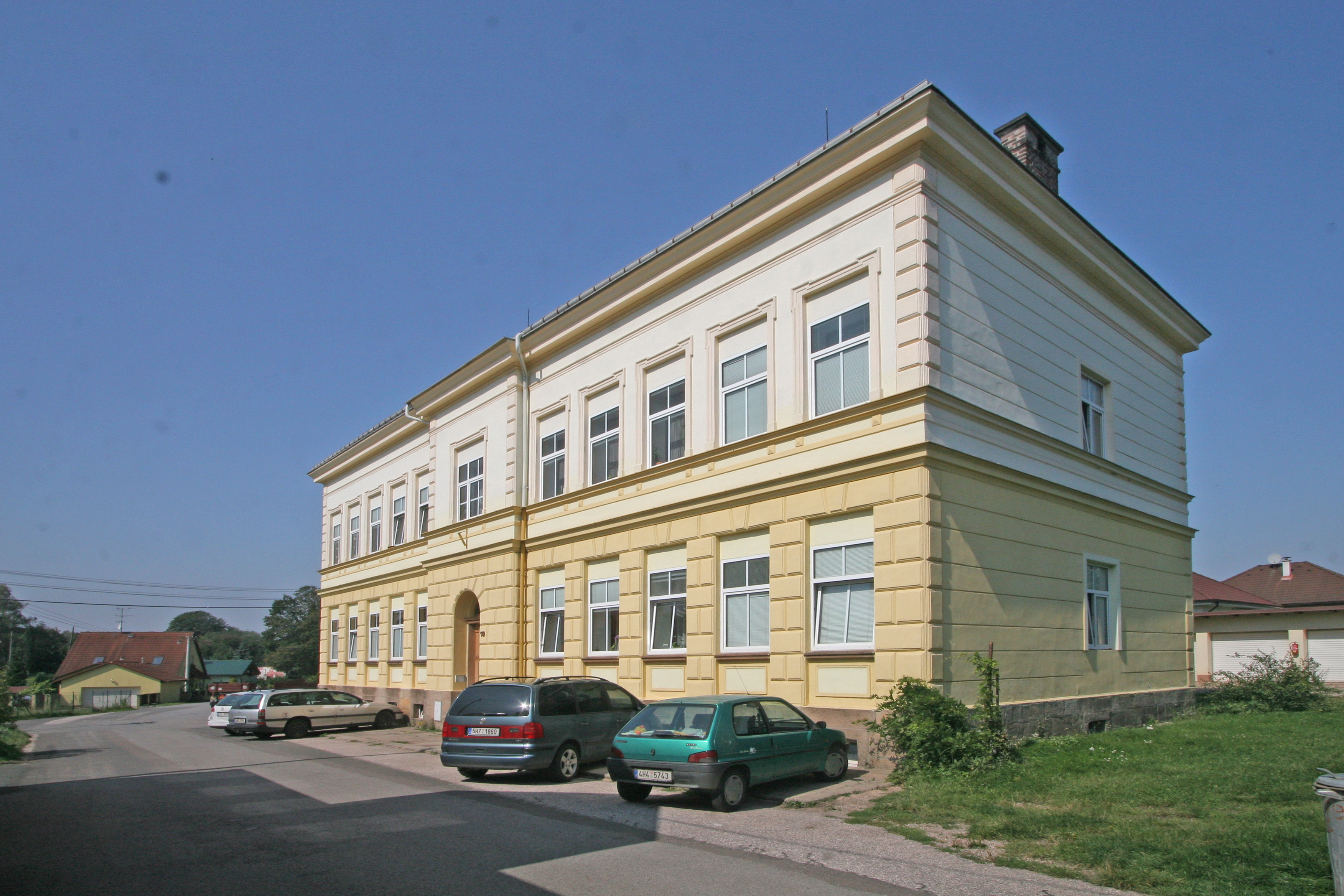 Bojiště čp. 79